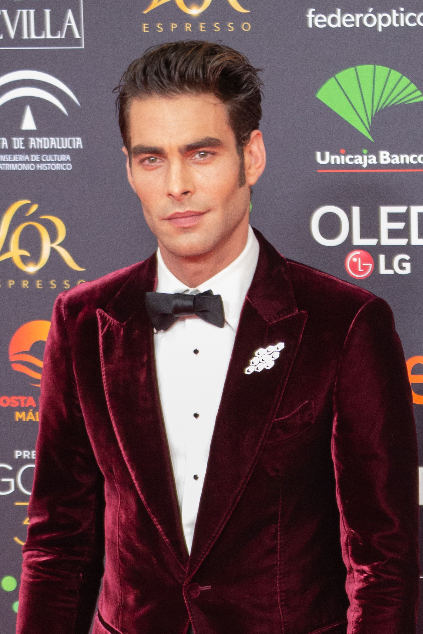 Jon Kortajarena en la alfombra roja de los premios Goya celebrados en Málaga en enero de 2020